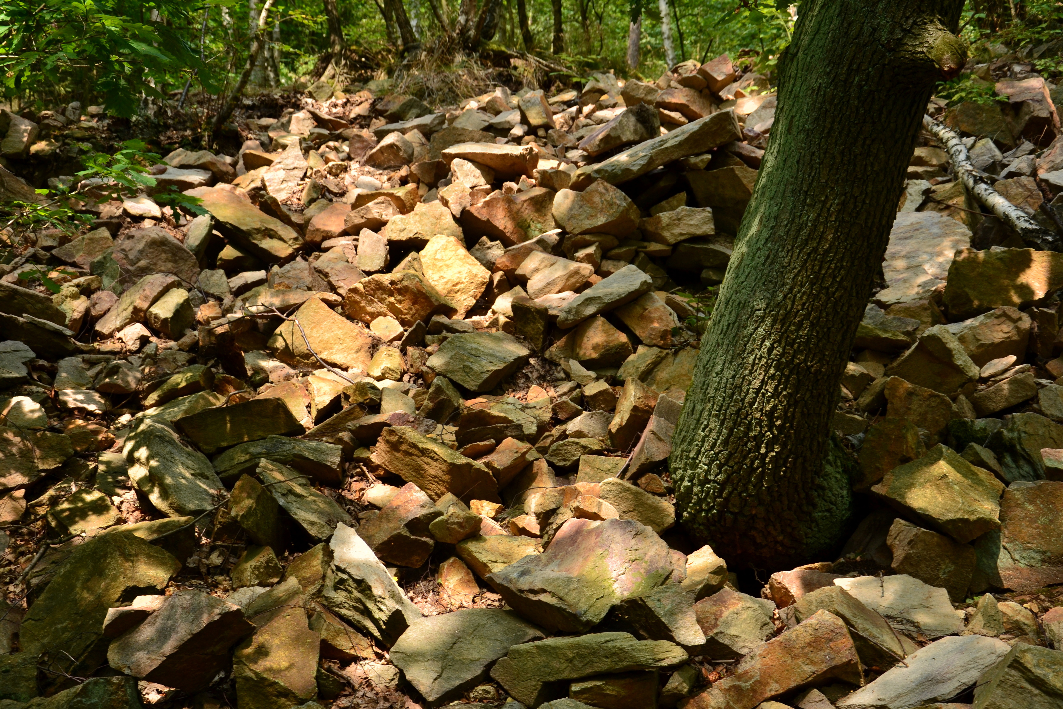 NPP Ciboušov - suťové pole s výkopy